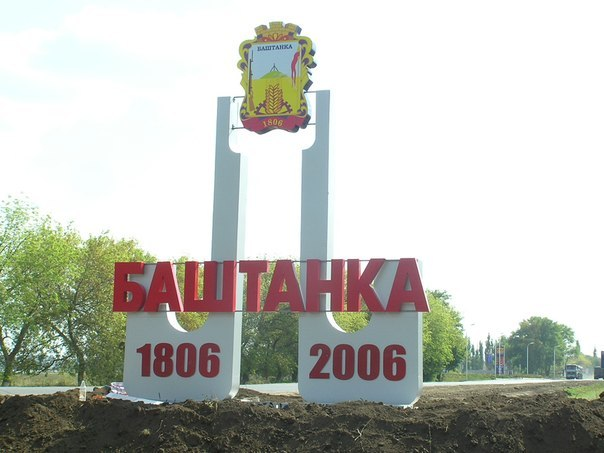 Знак при въезде